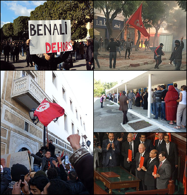 Collage of the 2011-2014 Tunisian revolution and tranistion